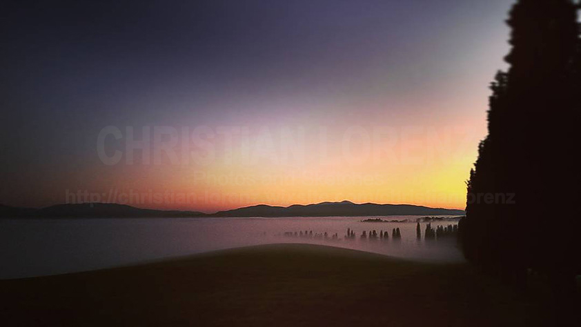 Caratteristico panorama mugellano in inverno.